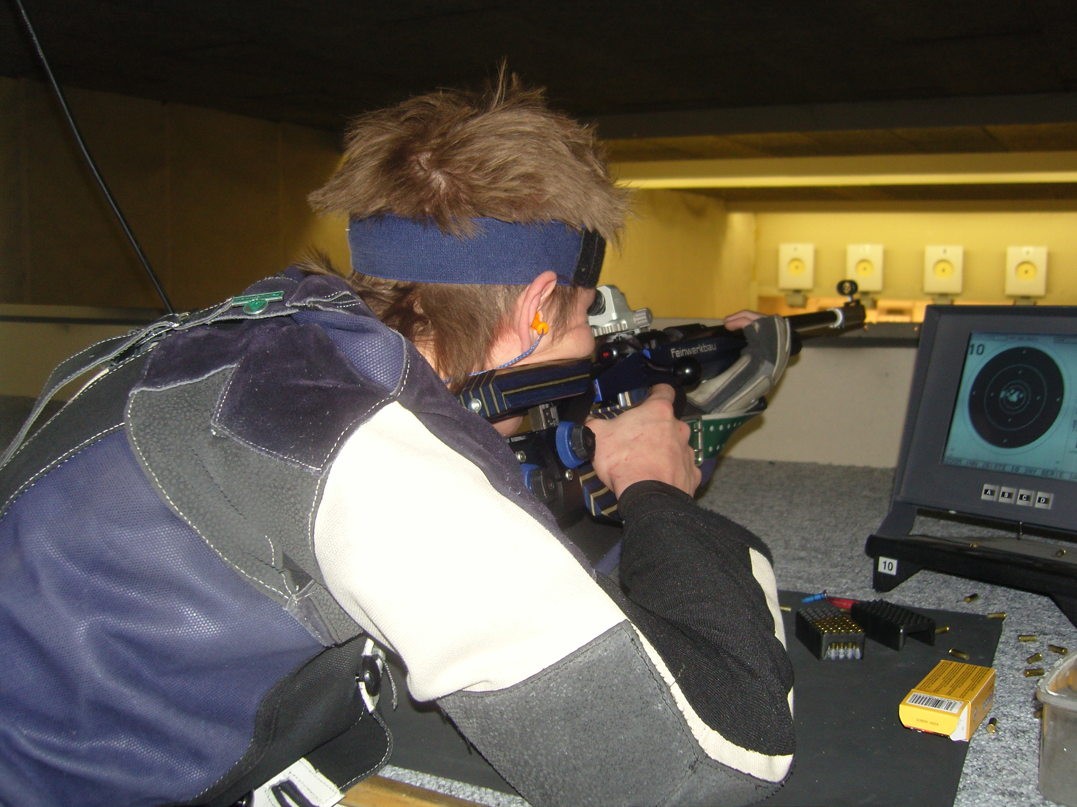 Salonriffelskytte